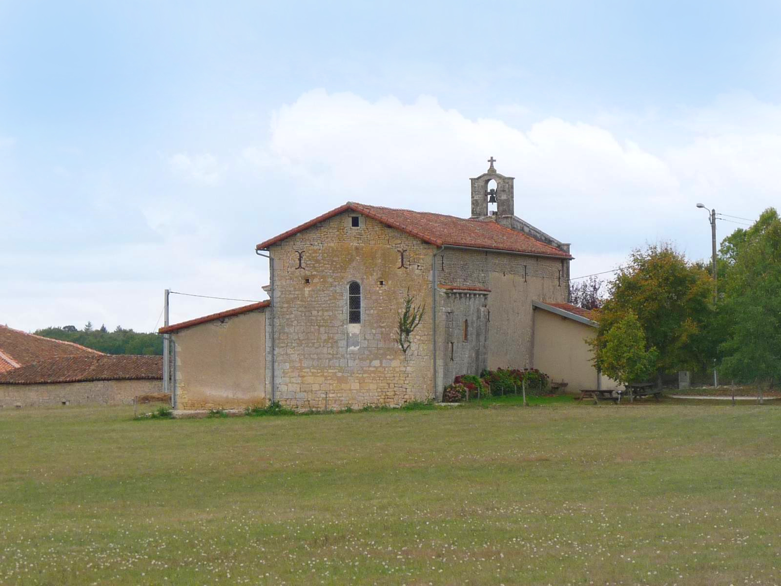 église de St-Coutant, Charente, France